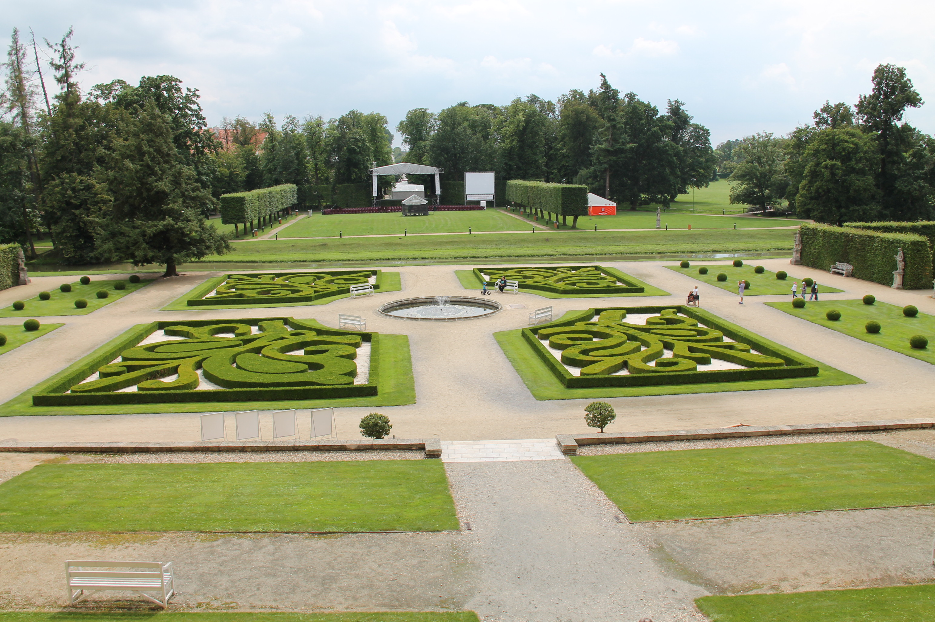 Zámek Jaroměřice nad Rokytnou, nám. Míru 1, Jaroměřice nad Rokytnou, Jaroměřice nad Rokytnou.